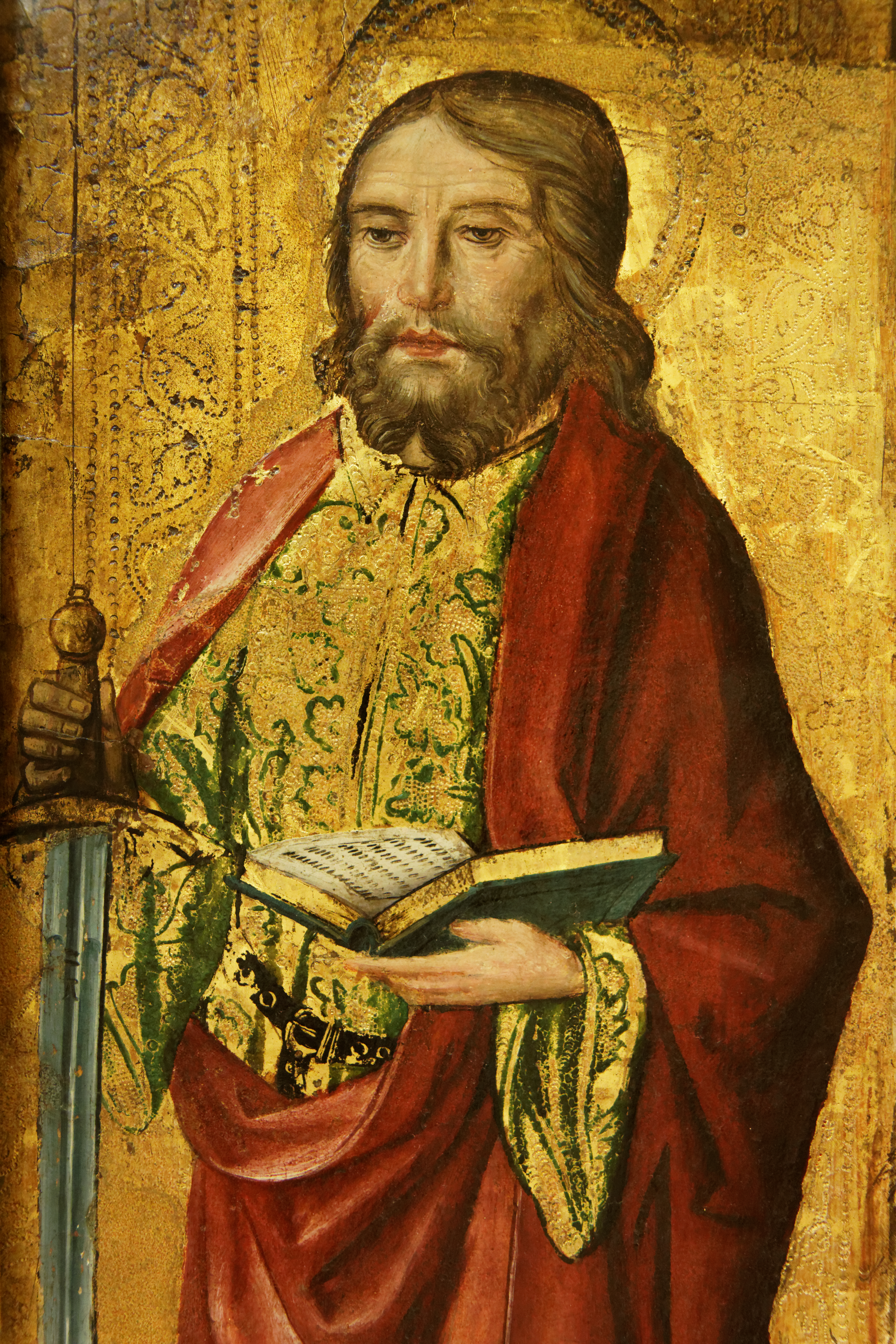 Détail d'un tableau représentant Saint Paul. Huile sur bois réalisée au 15ème siècle et provenant de Lombardie.